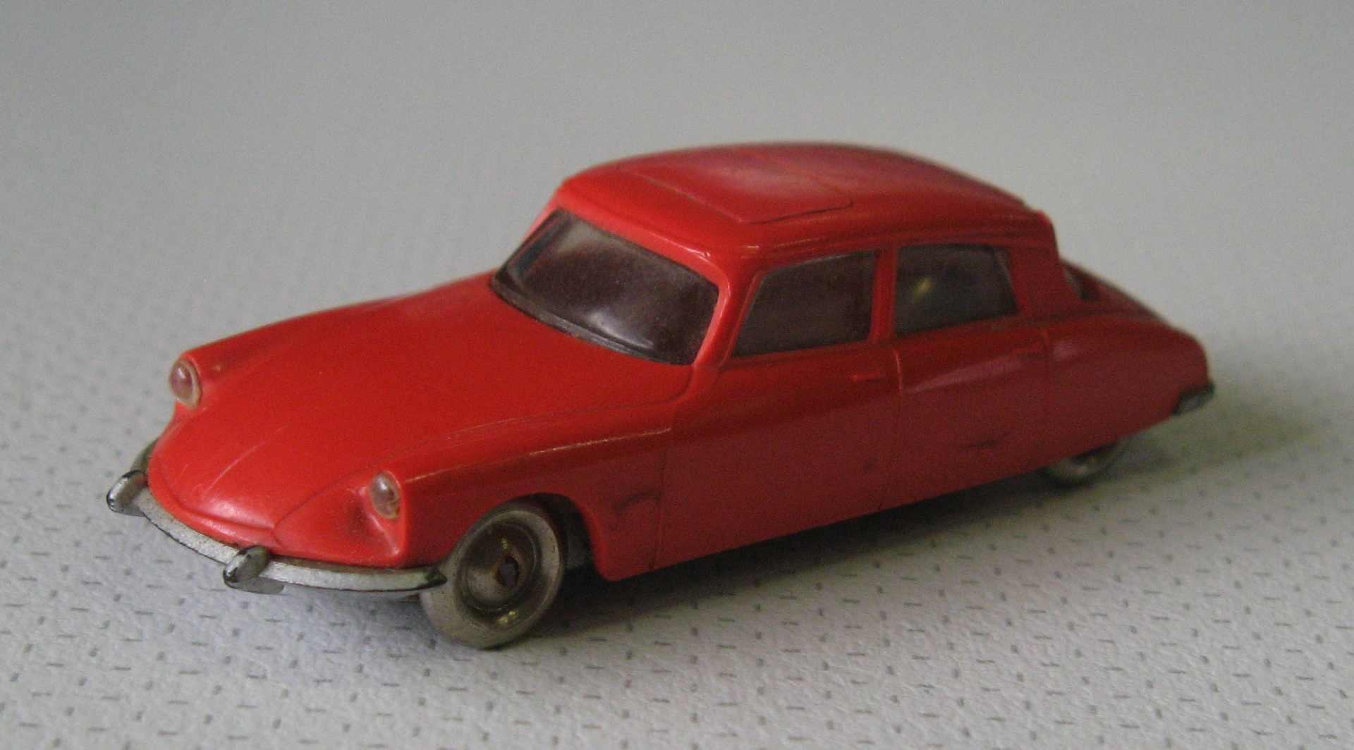 Lego Citroen DS19